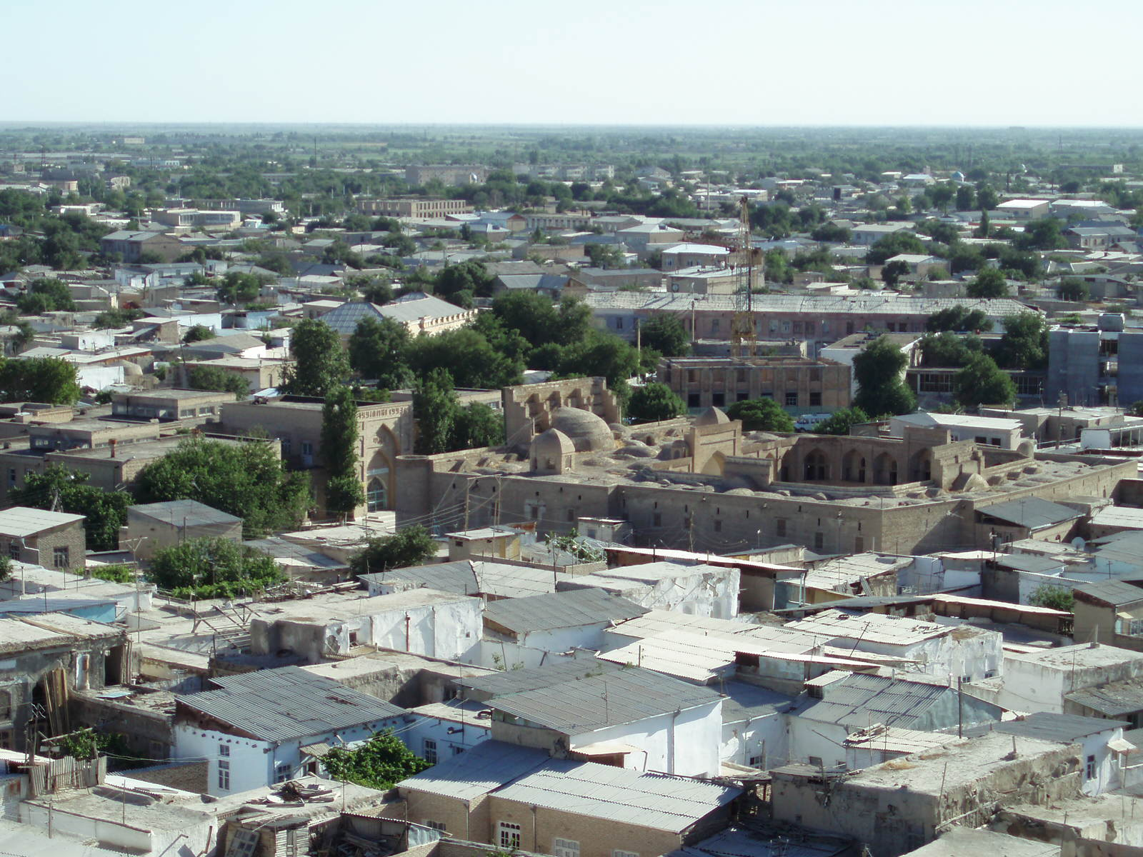 Bukhara skyline